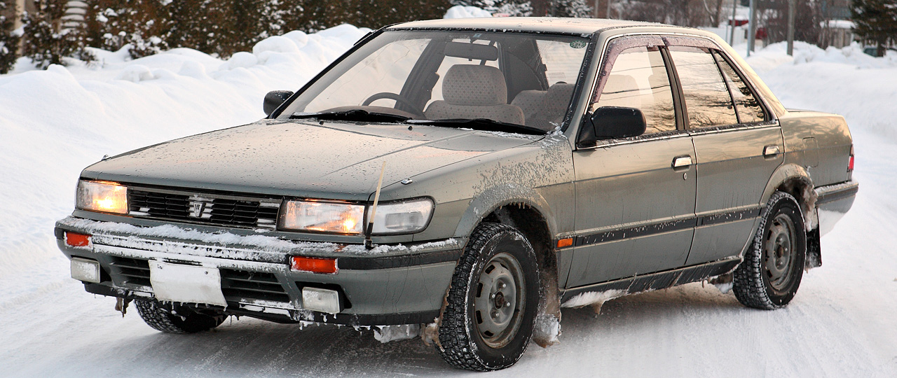 Nissan Bluebird 4door sedan 2.0D XE-Saloon F ( SU12 )